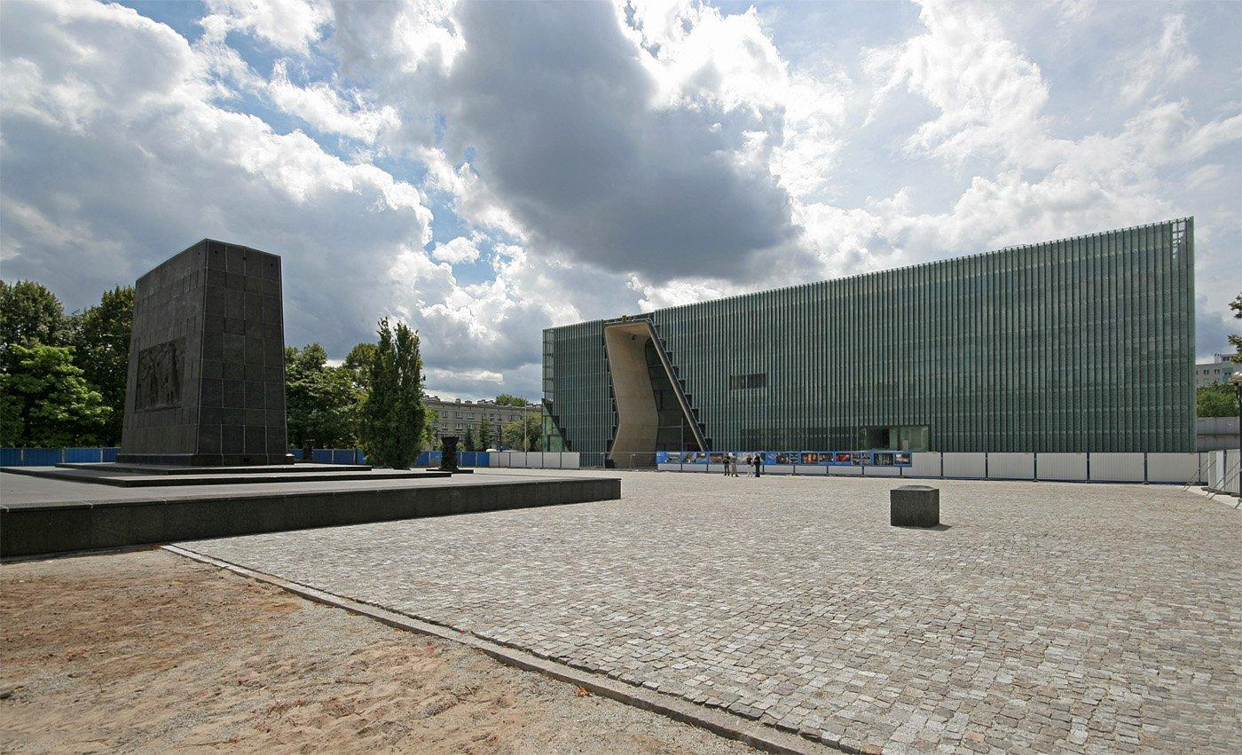 Muzeum od strony ulicy Zamenhofa. Po lewej pomnik Bohaterów Getta